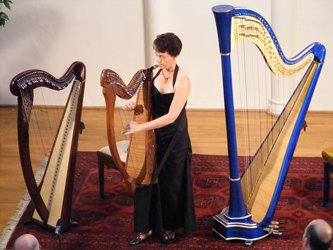 Armelle Gourlaouën, Harpiste aux 3 harpes